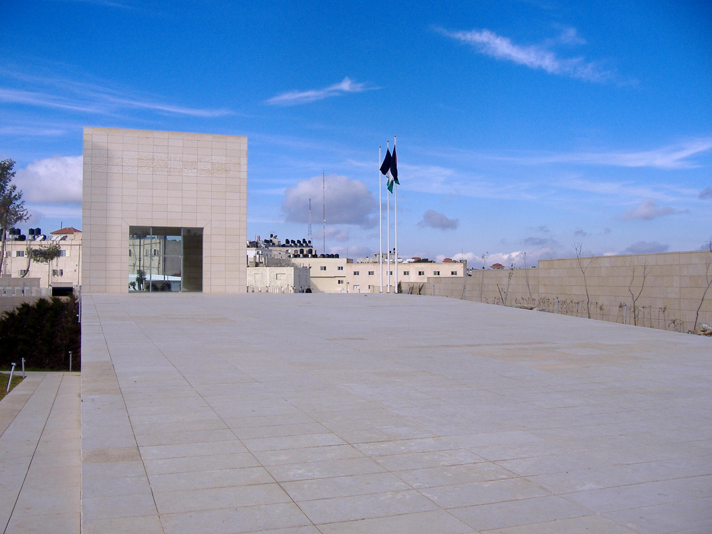 Mausoleum of Yasser Arafat (Mukataa, Ramallah)